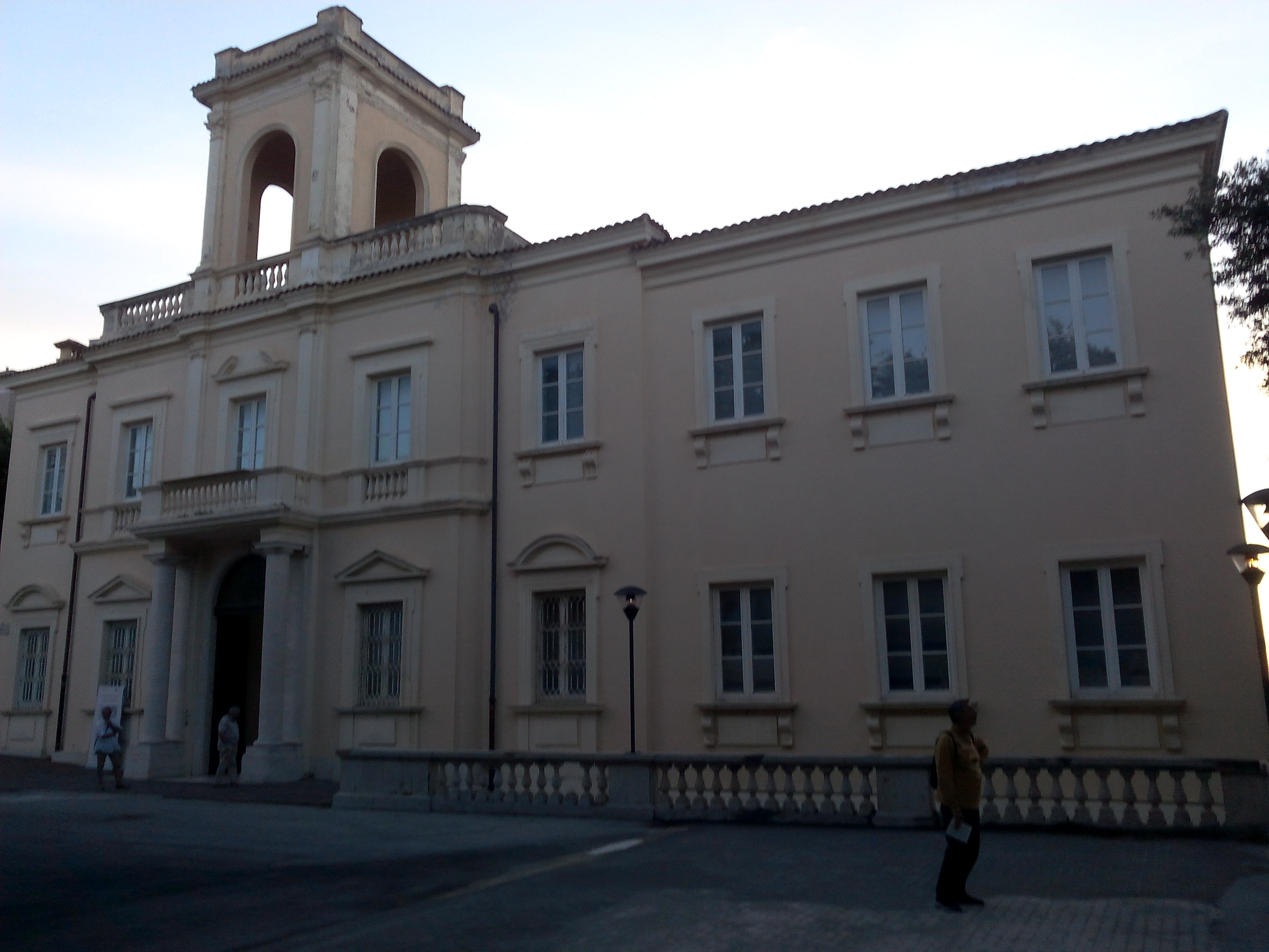 15 giugno 2018 Museo Michetti (Mumi) a Francavilla al Mare)